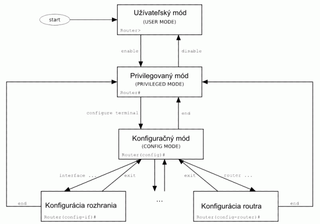 Cisco_ios_schema_sk